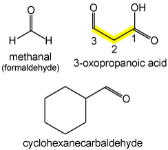 IUPAC naming (aldehyde)